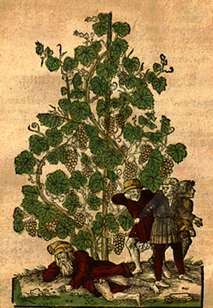 L'ivresse de Noé